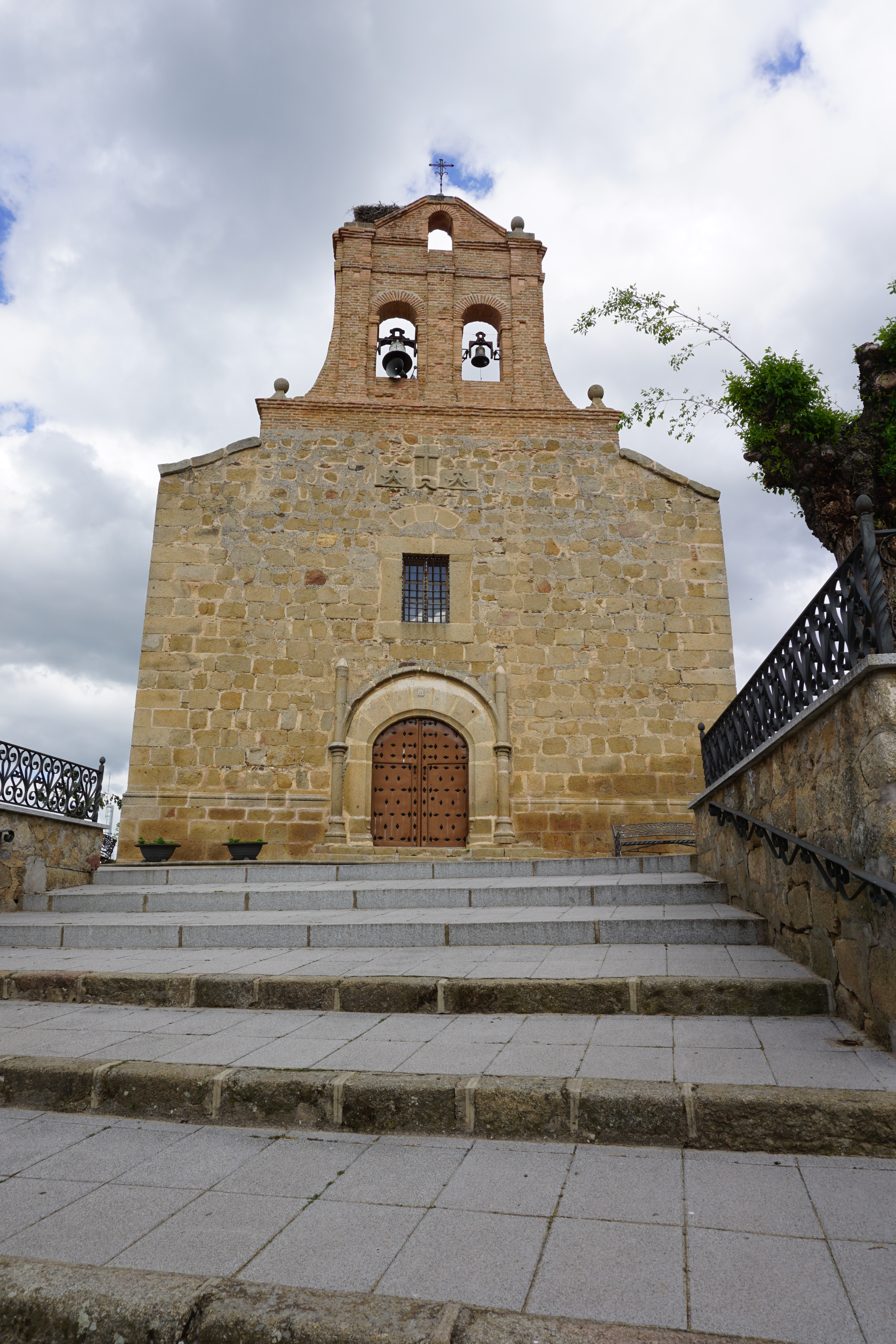 La Iglesia Parroquial de Santiago Apóstol en Aldeanueva de Barbarroya. Q1641564